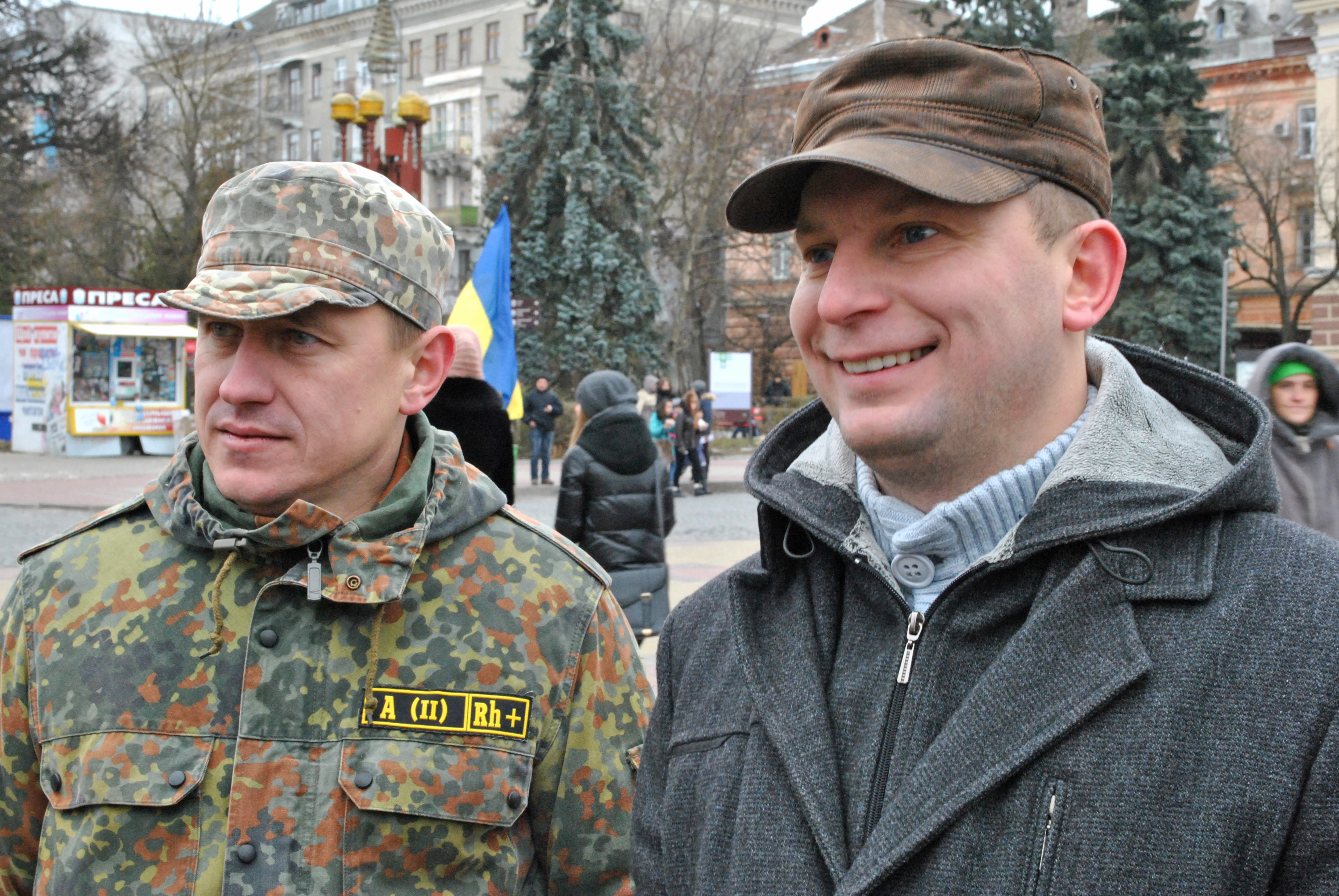 Український громадсько-політичний діяч, член партії «Блок Петра Порошенка», народний депутат України 8-го скликання Степан Барна (справа).